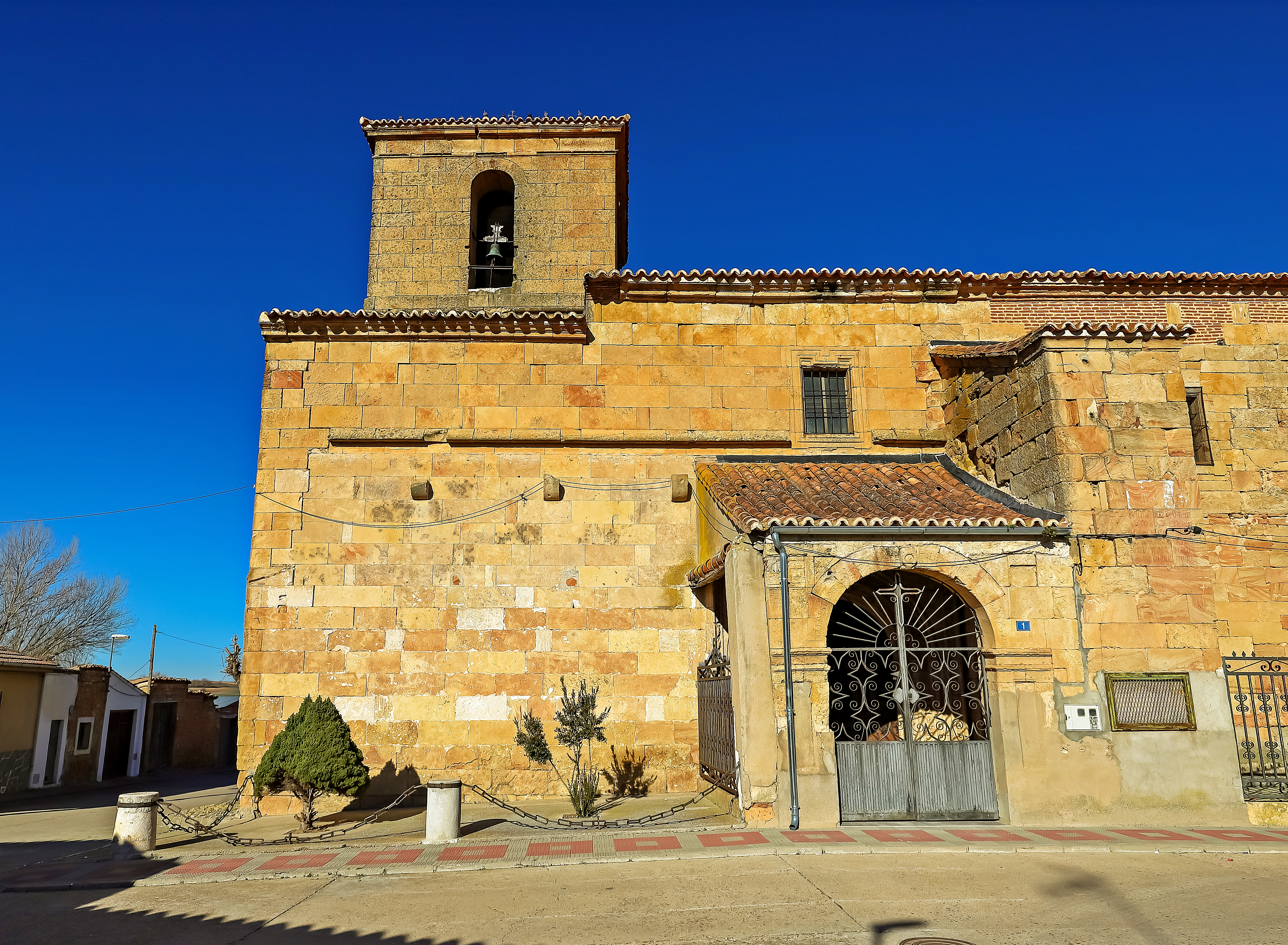 Espino de la Orbada, municipio de la comarca de La Armuña, provincia de Salamanca.